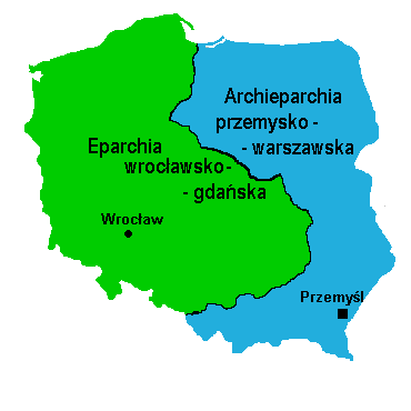 Metropolia Polska KK obrządku biz-ukr.